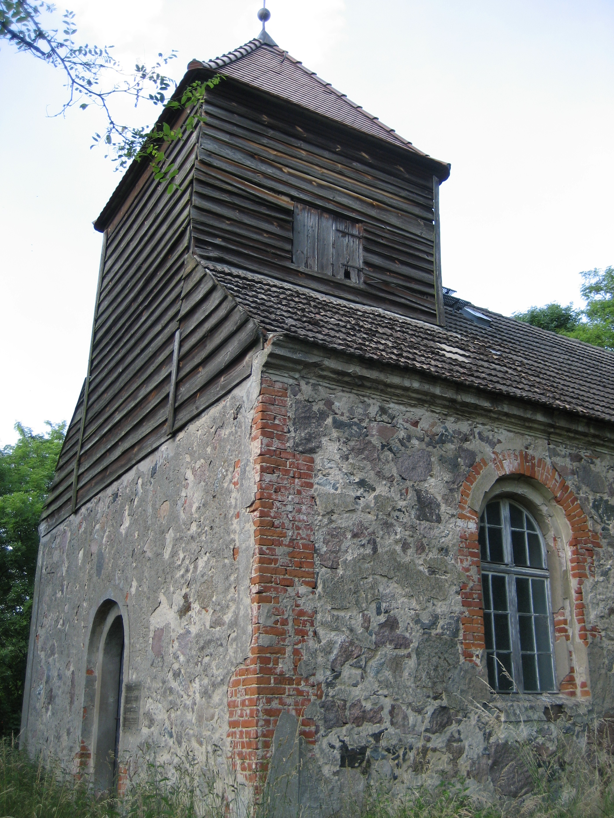 Kirche Roggow aus Blickrichtung Südenwesten.